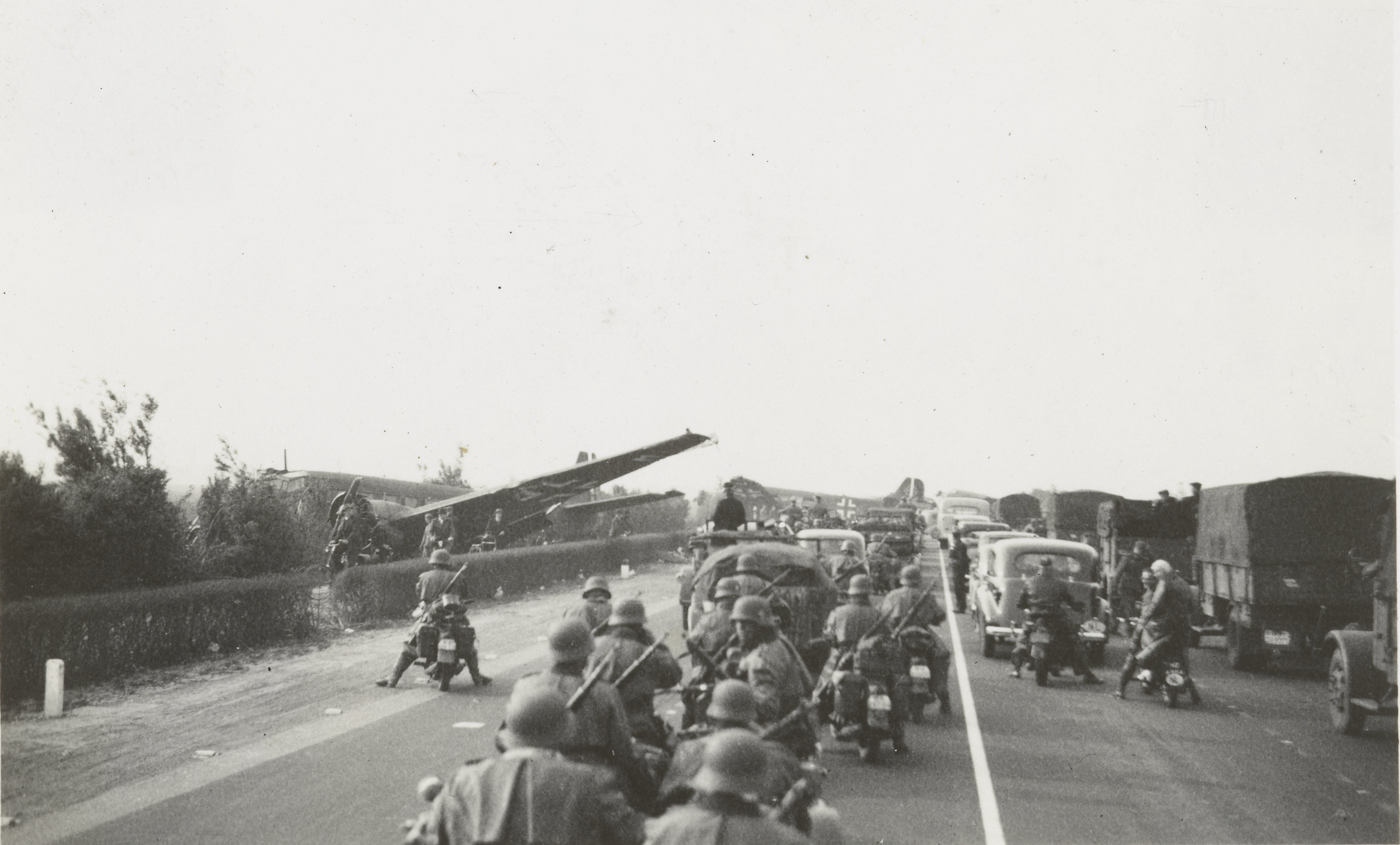 Langs de kant van Rijksweg 13 tussen Delft en Den Haag, nabij vliegveld Ypenburg, liggen twee neergeschoten Duitse gevechtsvliegtuigen, een is een Junker 52. Op de weg een kleine colonne Duitse motorrijders, op de rechterweghelft vrachtverkeer en auto's. Foto dateert vermoedelijk uit de meidagen 1940.